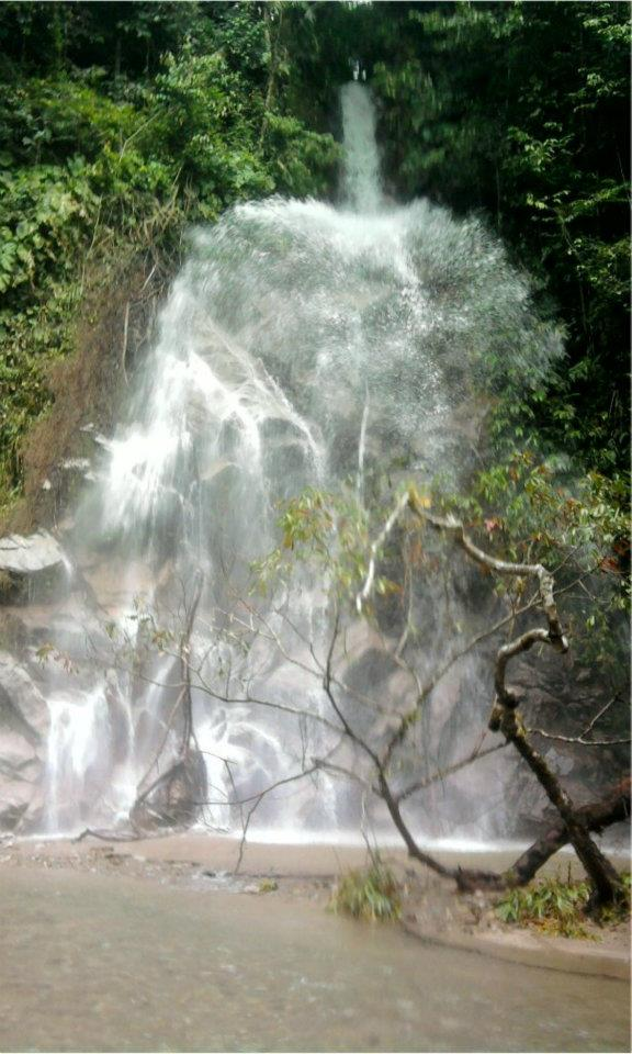 Casca las Mandingas